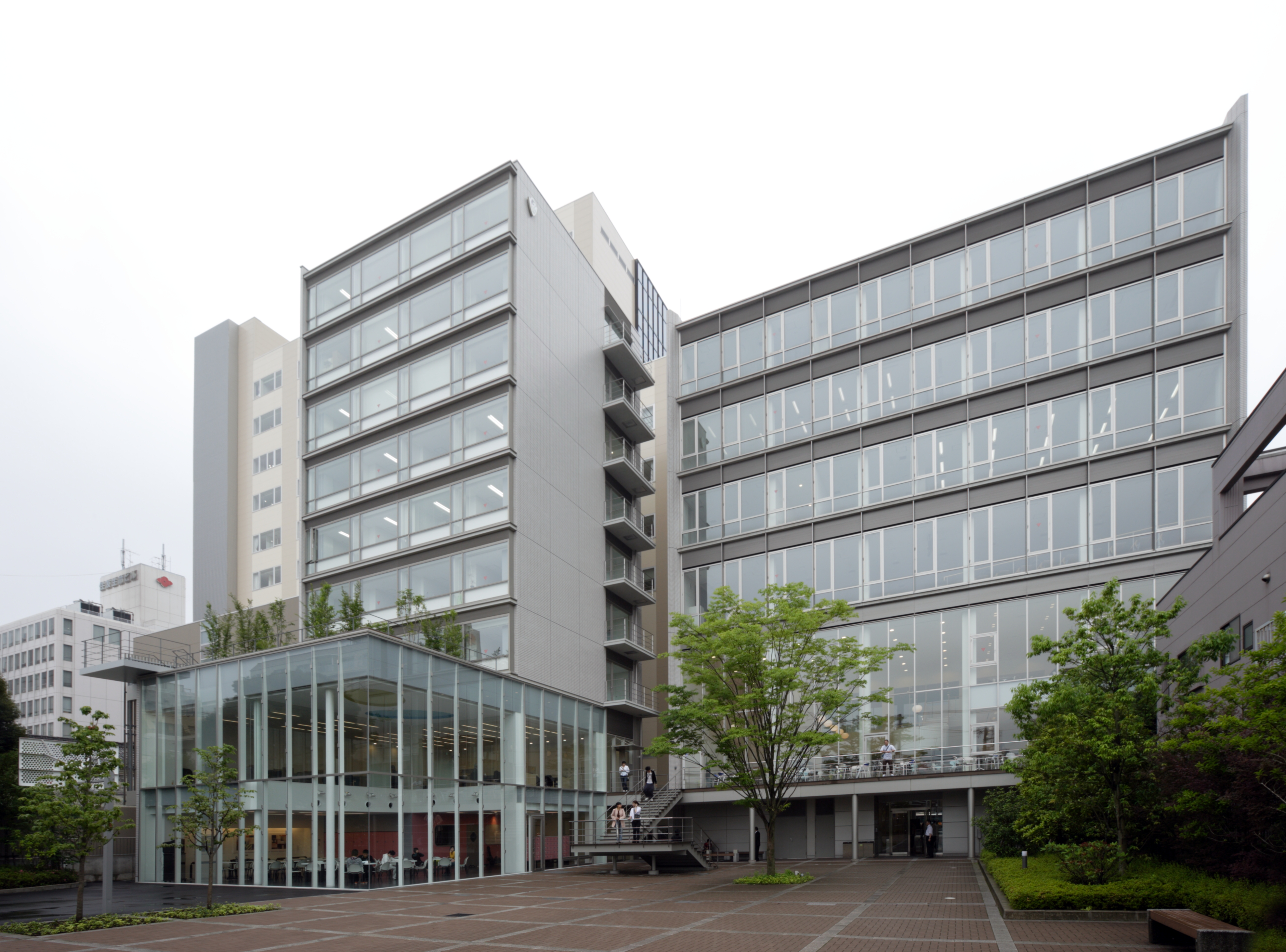 宇都宮シティキャンパス